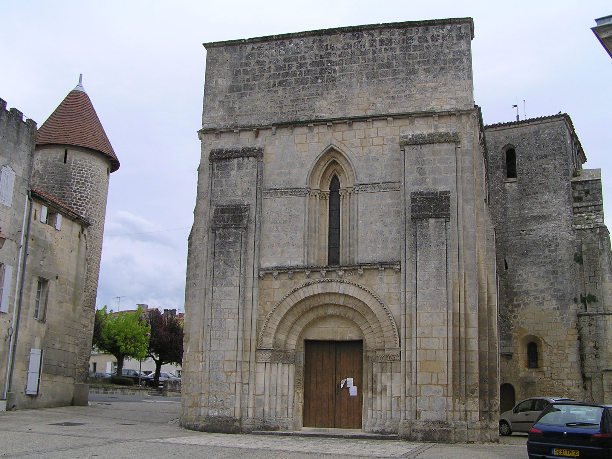 église de Nersac, Charente, France